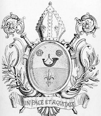 Ex libris de Dom Geradvs Rubens ex S Bernadvs in Scaldim Abbas